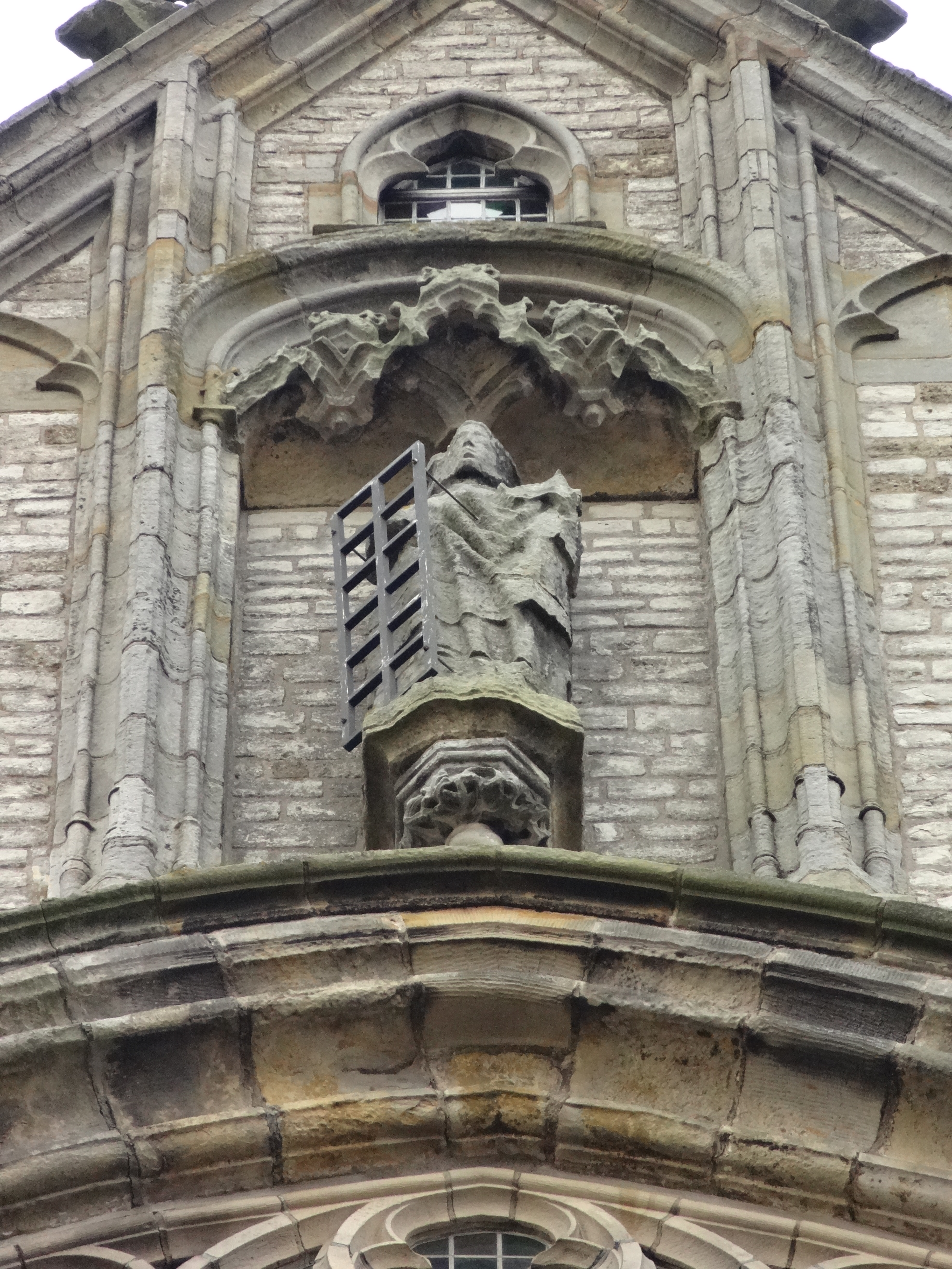 Laurentius van Rome op de zuidbeuk van de Sint Laurenskerk te Alkmaar.